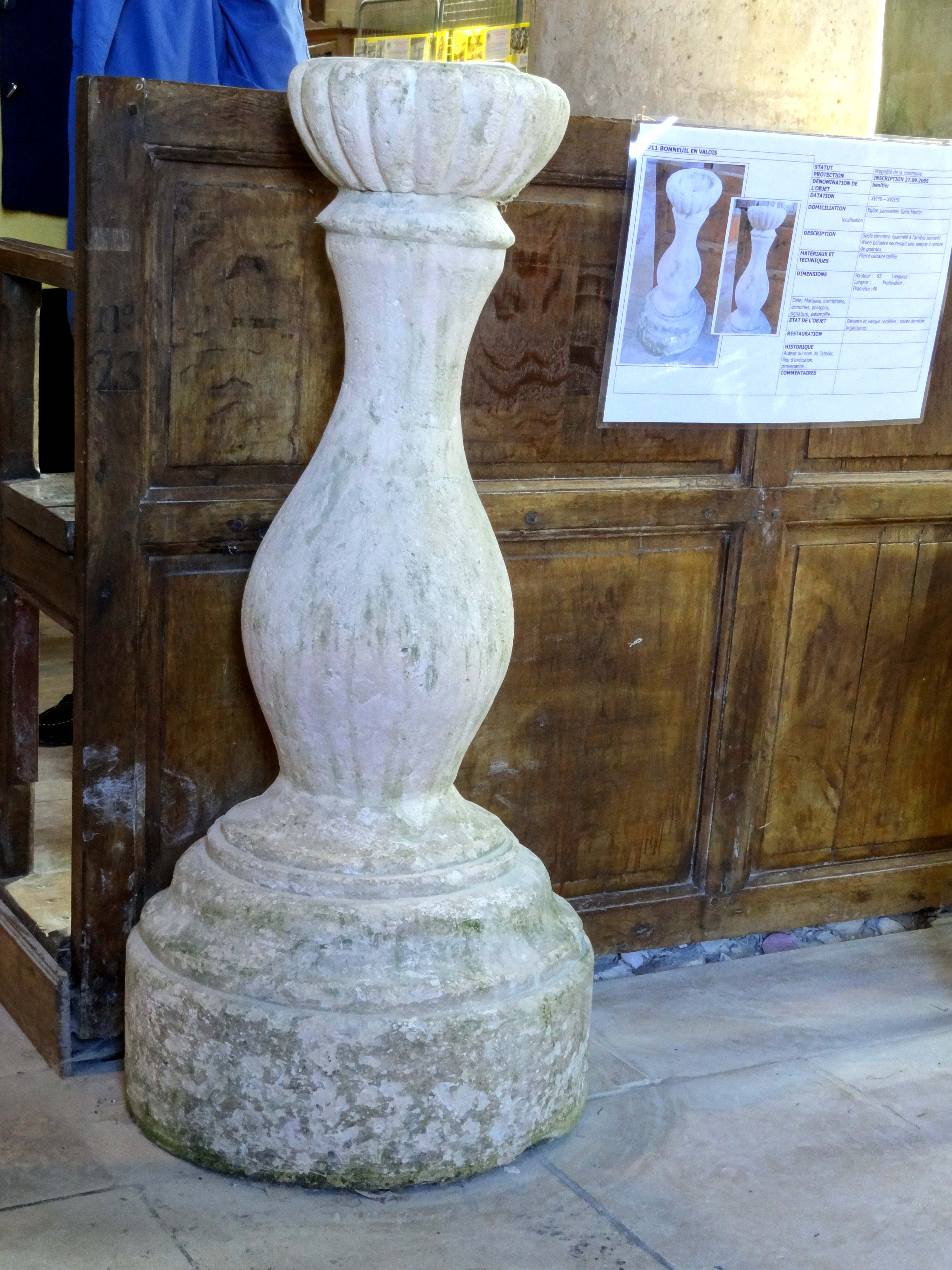 Mobilier de l'église - voir titre.